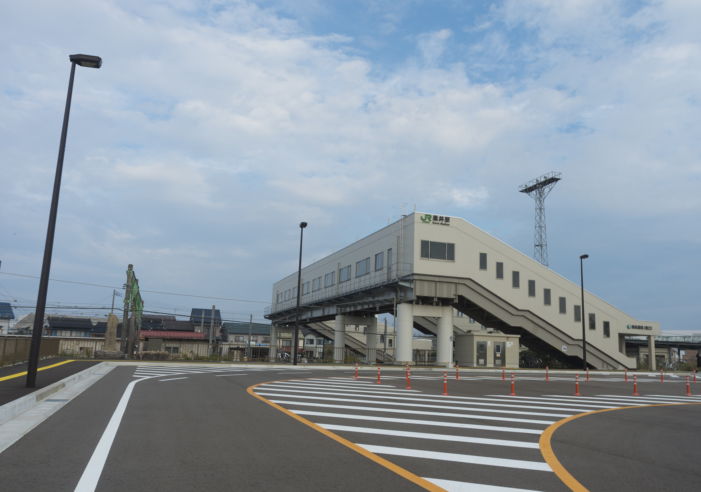 東日本旅客鉄道株式会社信越本線黒井駅全景